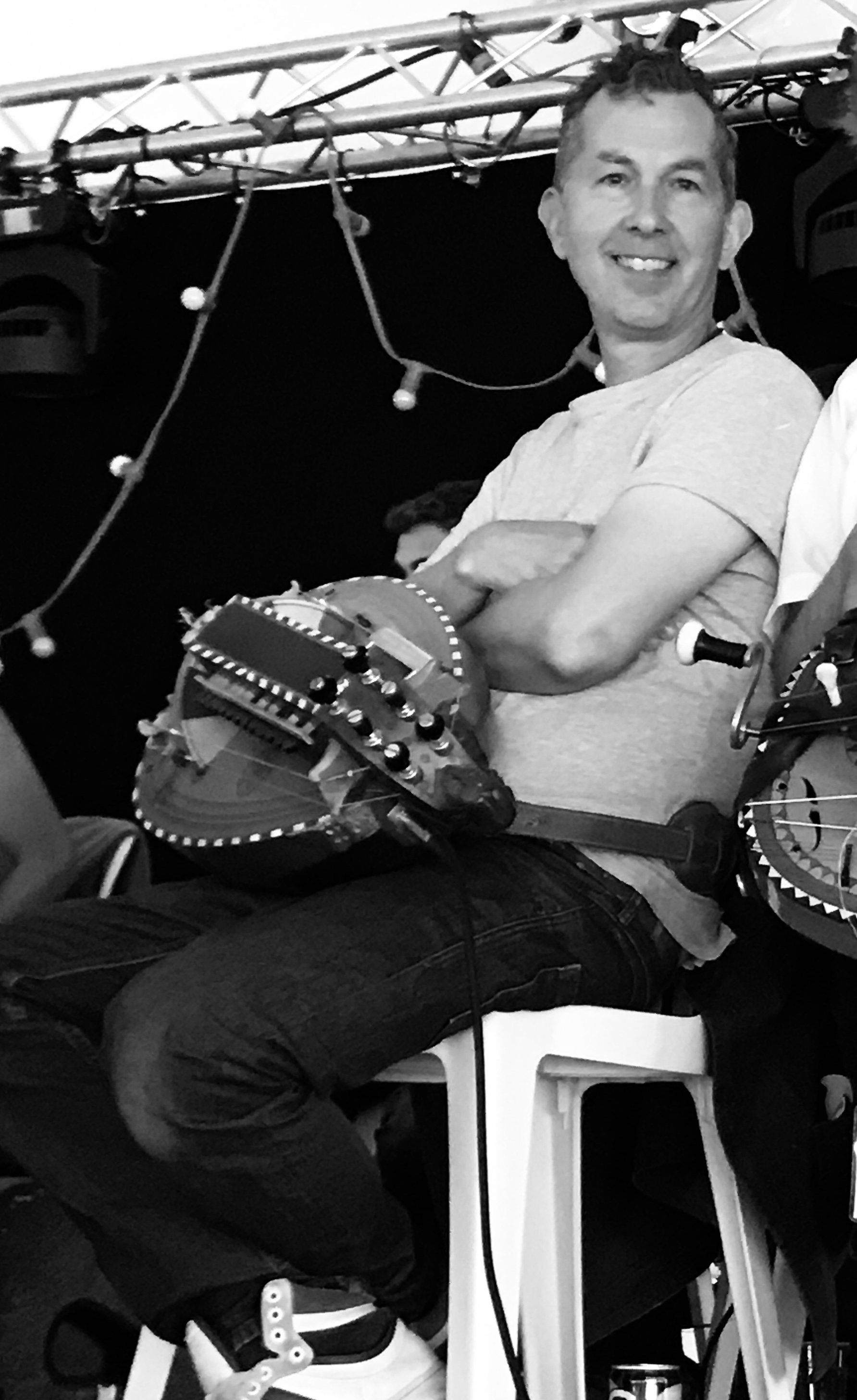 Nigel Eaton à la fête de la vielle d' Anost (71) le 19 aout 2017.